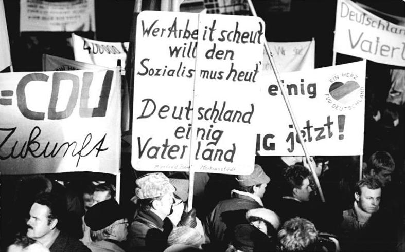 Leipzig, Montagsdemonstration ADN 22.9.90 Leipzig: Herbst 1989 Teilnehmer an einer Montagsdemonstration. [Leipzig.- Demonstranten mit mit Transparenten "Deutschland einig Vaterland".]